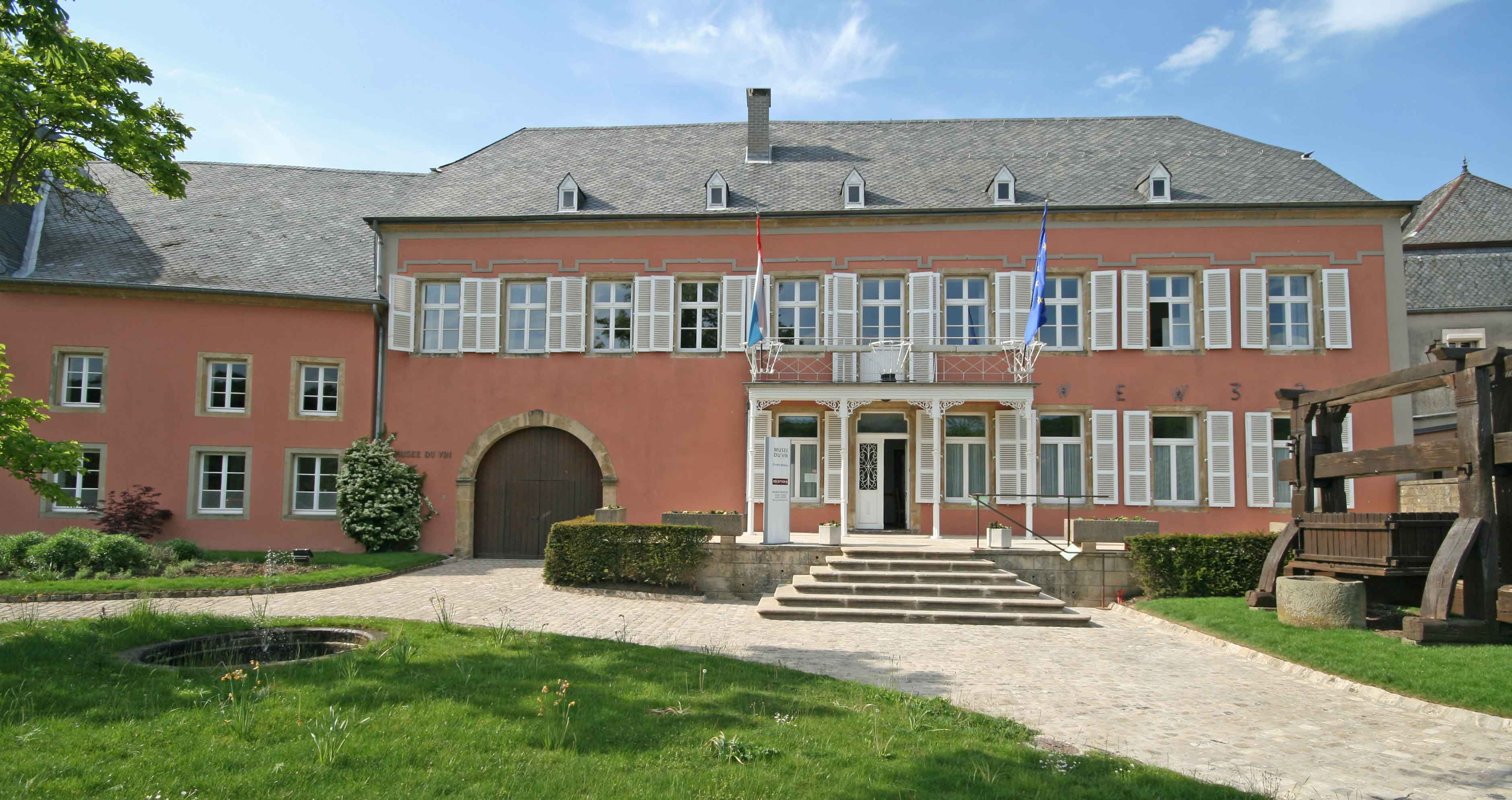 De Wäimusée zu Éinen.